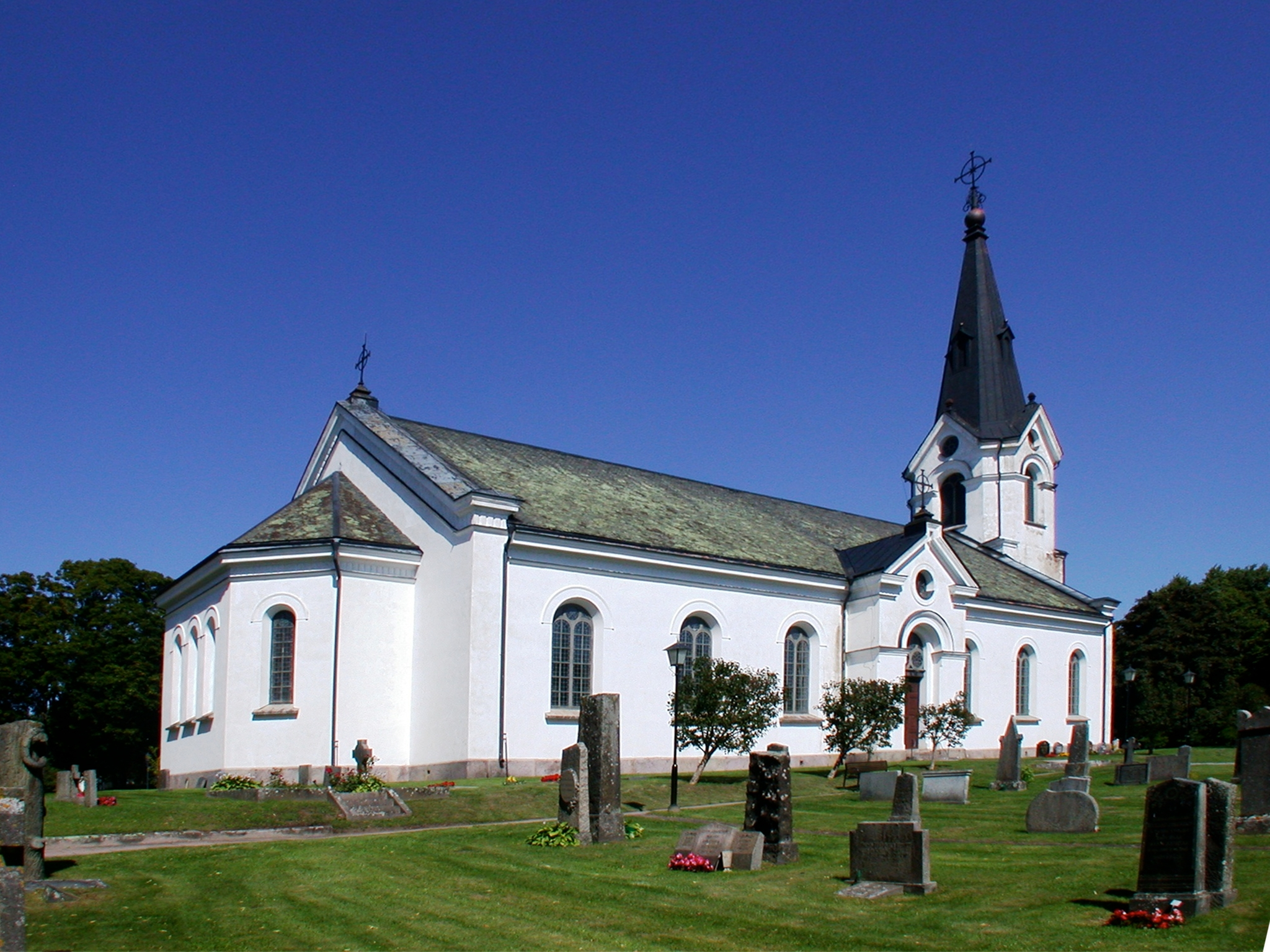 Hassle kyrka, Mariestad, Sweden